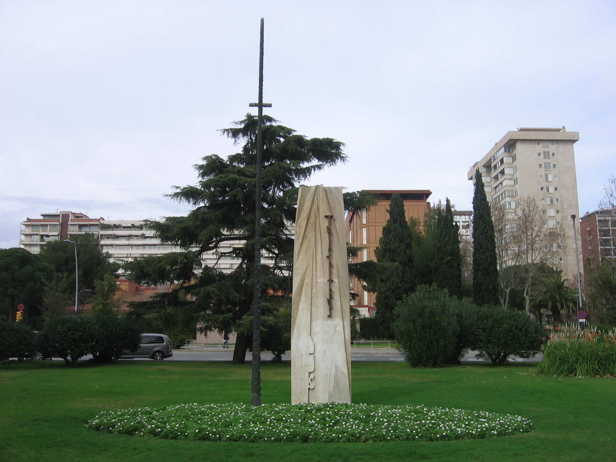 Monumento a Pío XII (1961), de Julià Riu i Serra, Plaza de Pío XII.